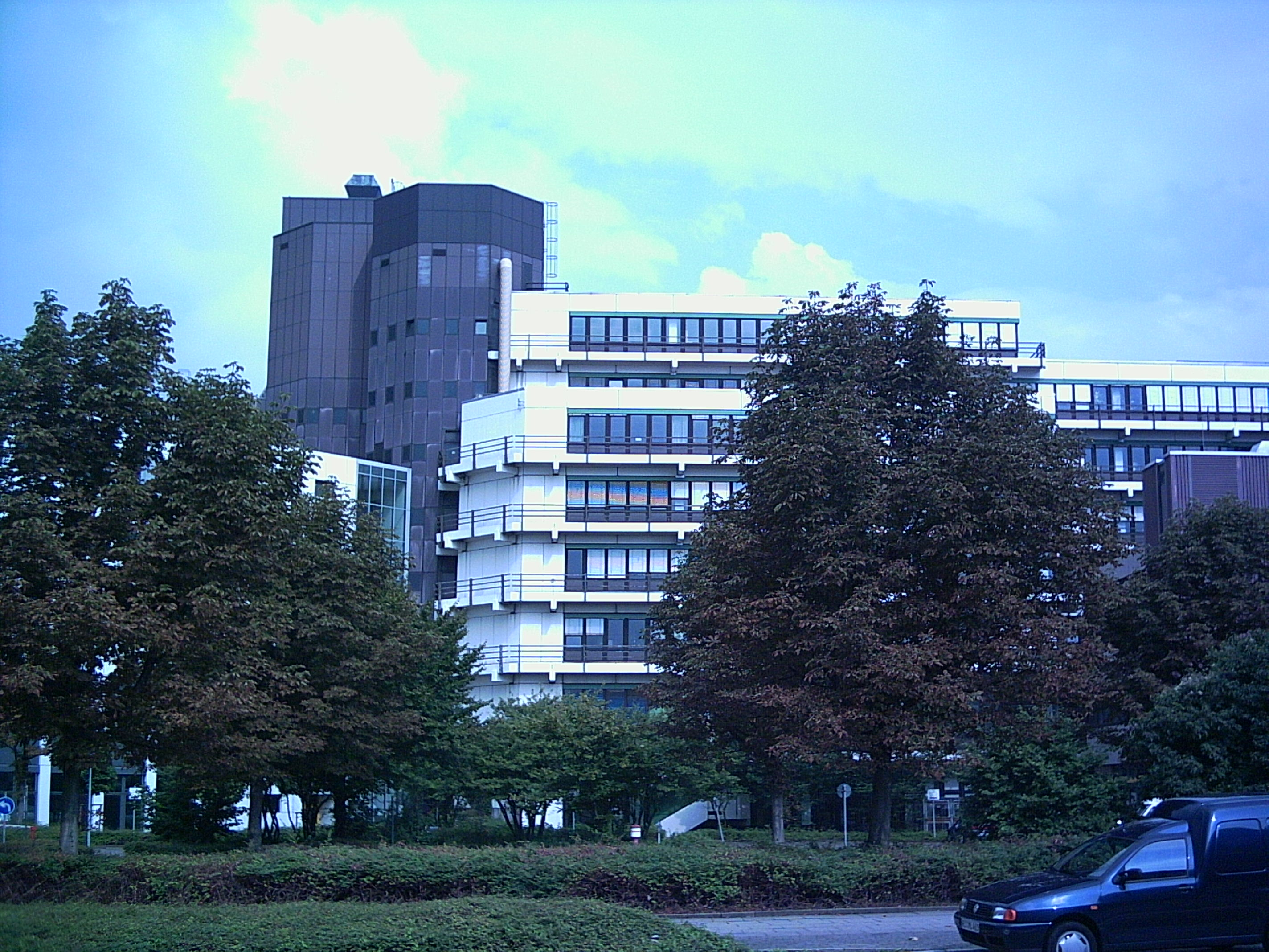 Universität Duisburg-Essen, Standort Essen